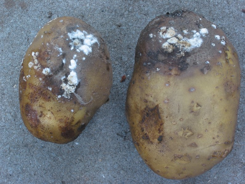 zelfgemaakte foto van door fusarium aangetaste knollen ras Fresco; half augustus Categorie:Afbeelding plant